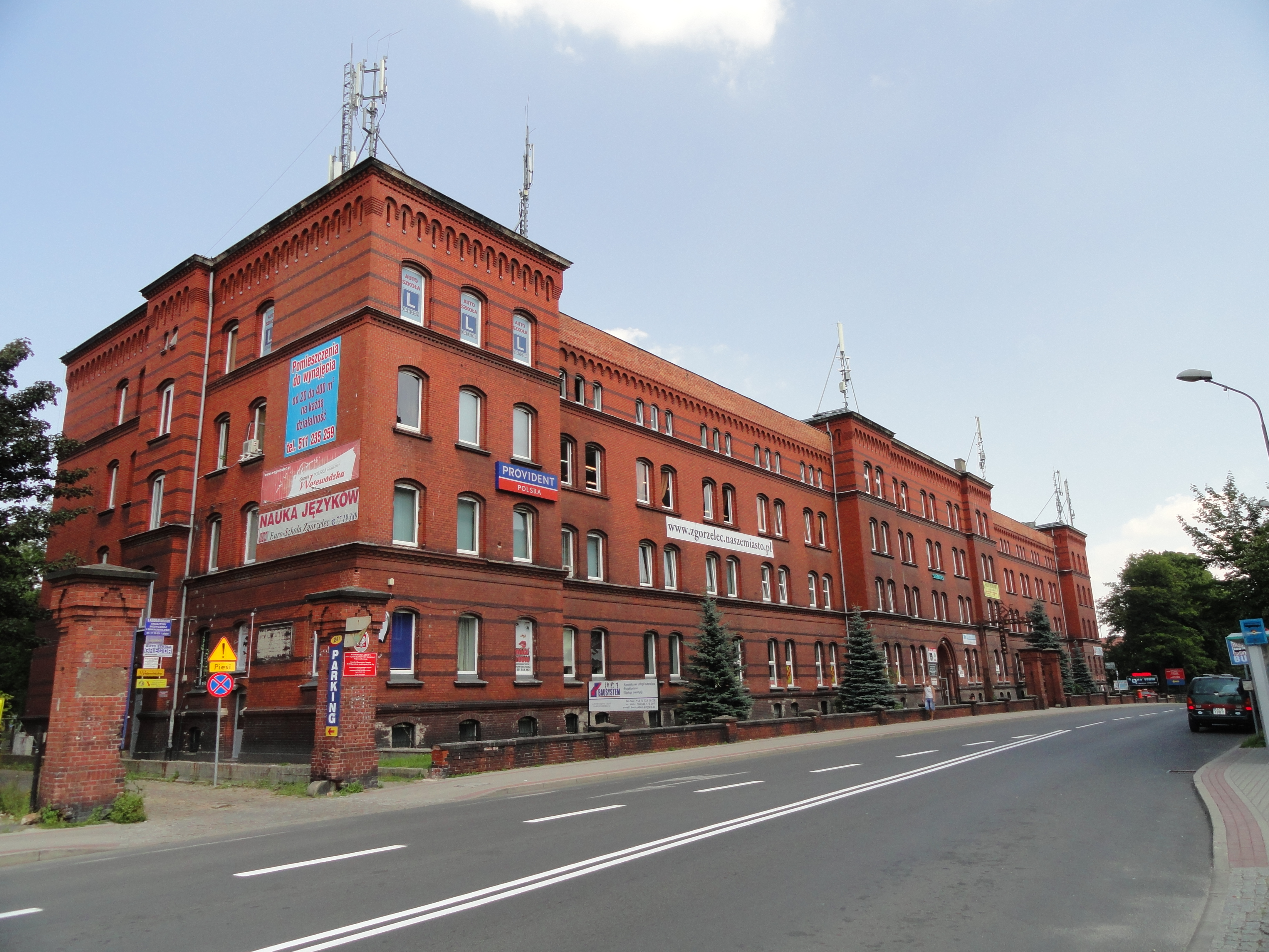 Ehemalige Neue Kaserne in Zgorzelec